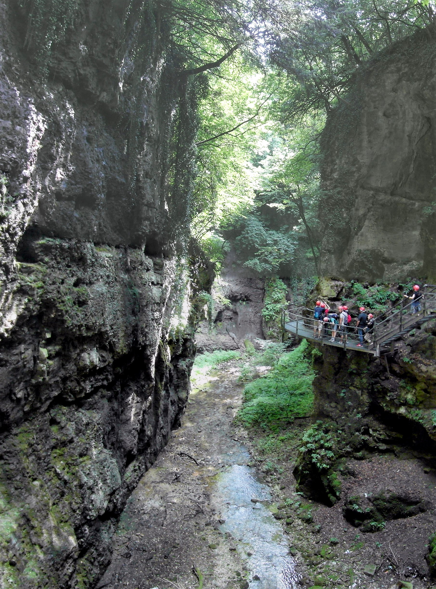 Canyon rio Sass